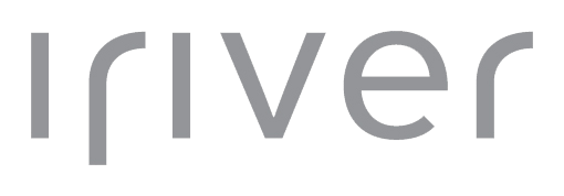 아이리버